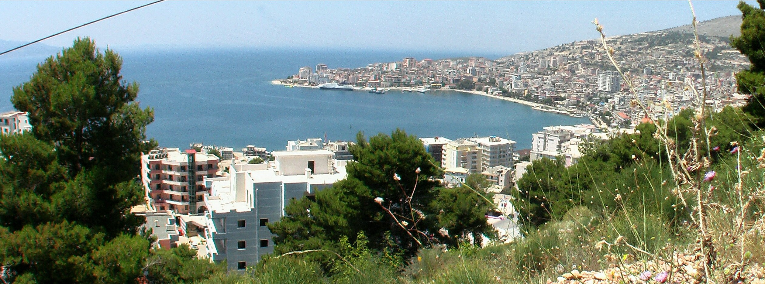 SarandëPanorama